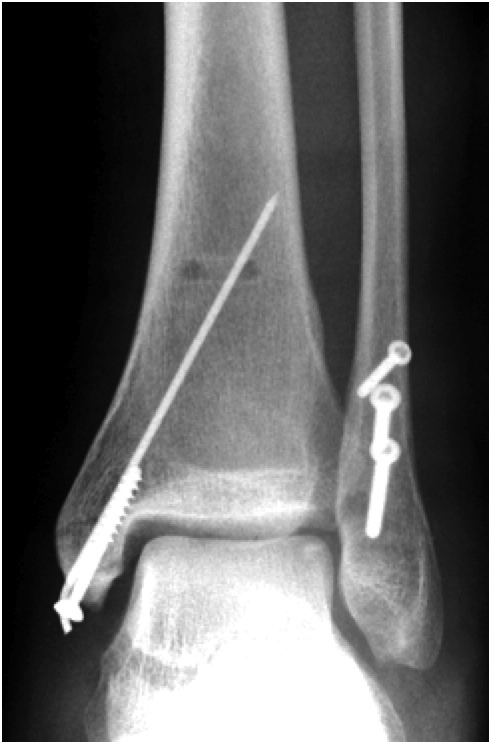 Sprunggelenkfraktur schrauben